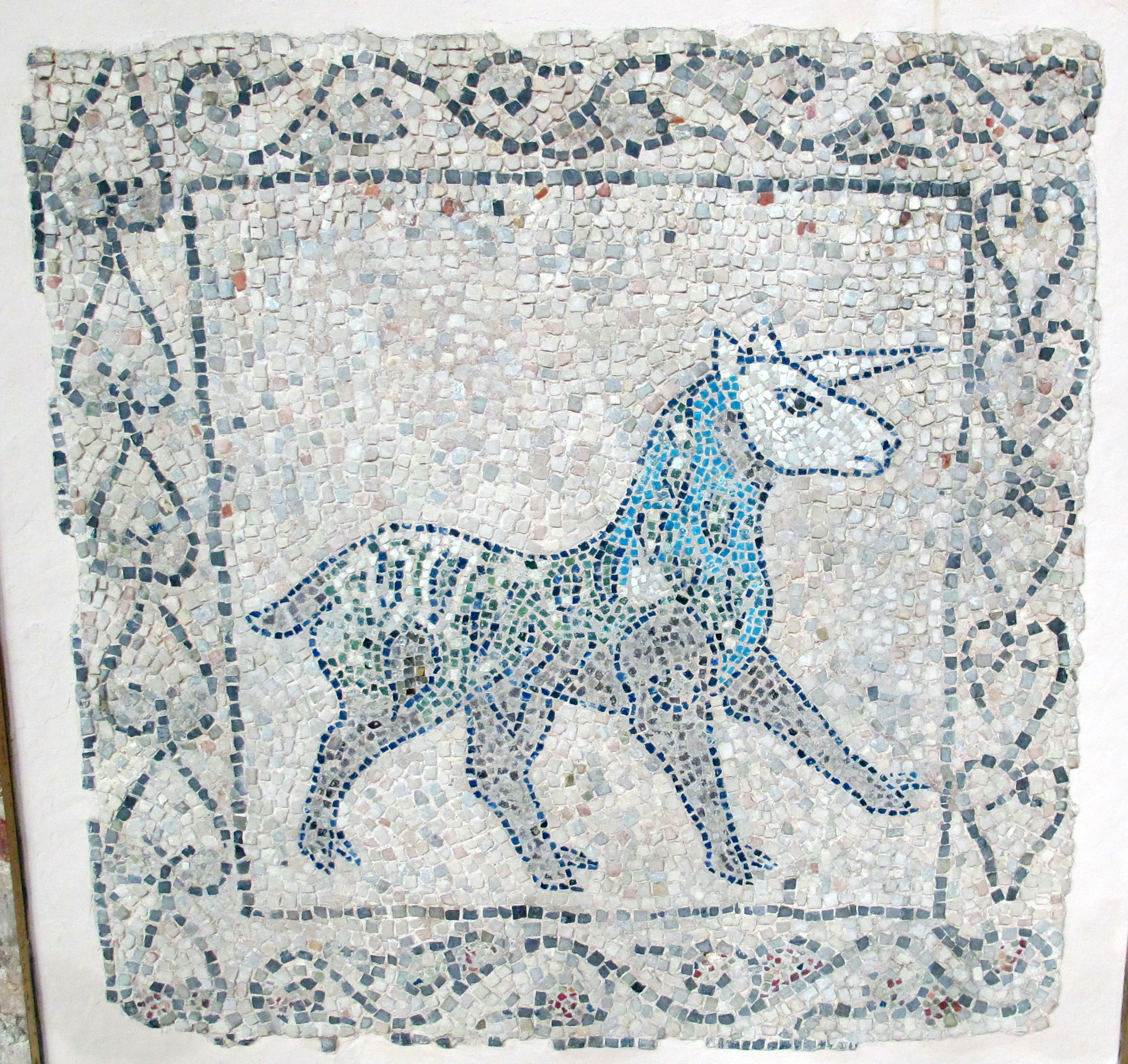 Frammenti di mosaico pavimentale del 1213